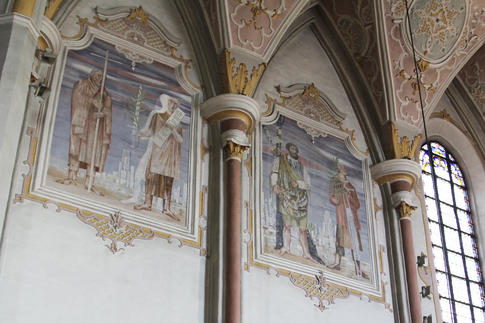 Apostelbilder in der Pfarrkirche St. Laurentius Altheim, OÖ